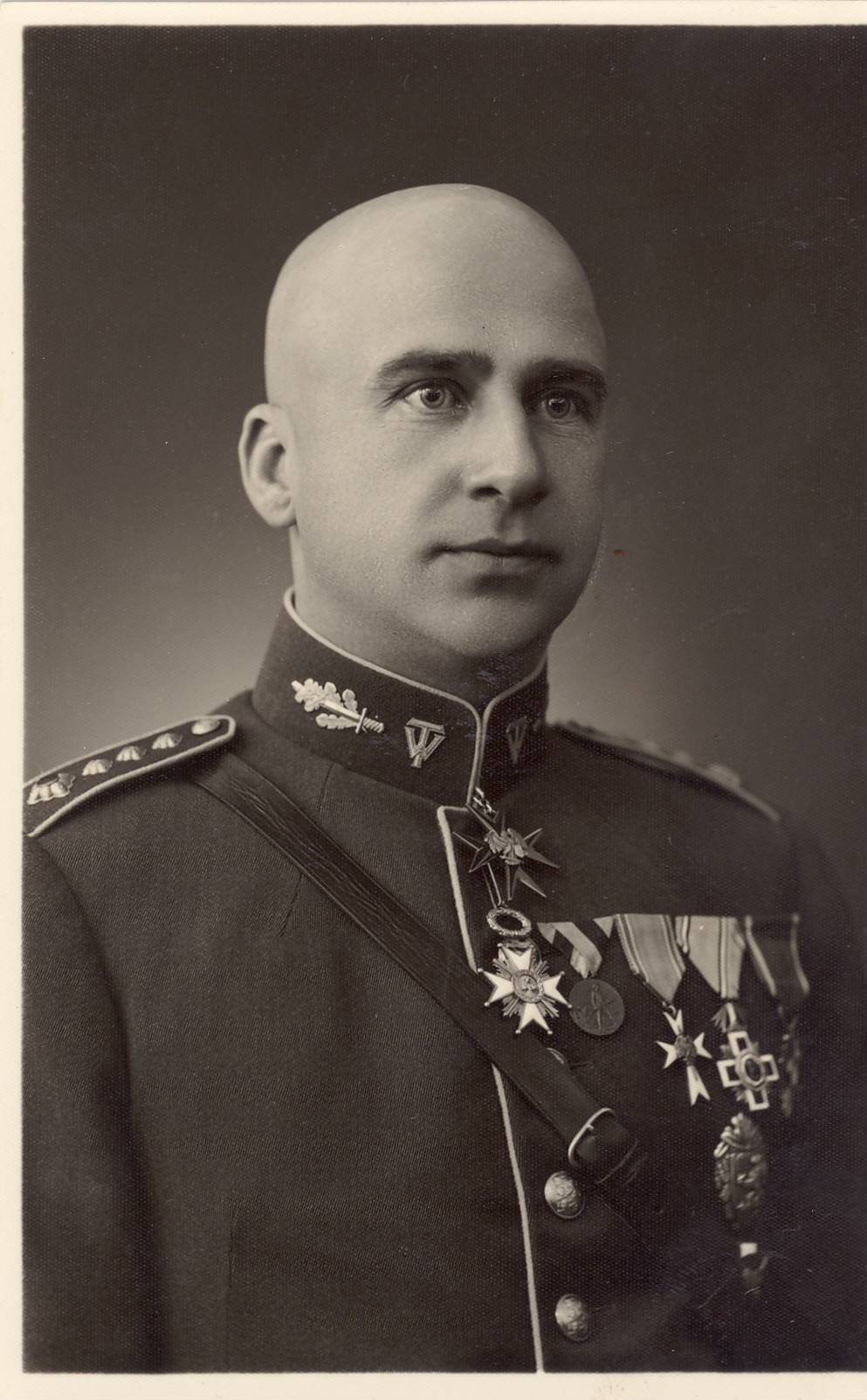 Viktor Roovere